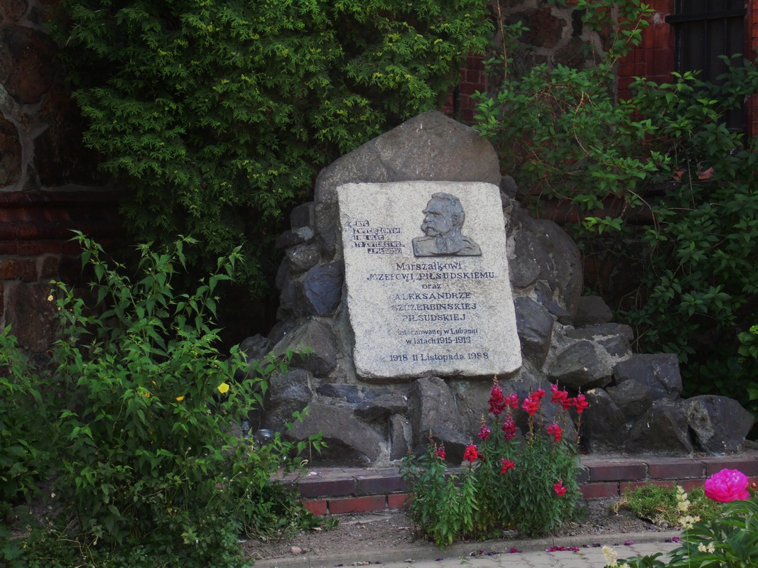 Obelisk ku czci J. Piłsudskiego.